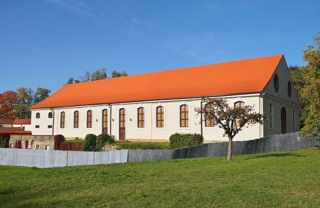 Rychnov nad Kněžnou, zámecká jízdárna